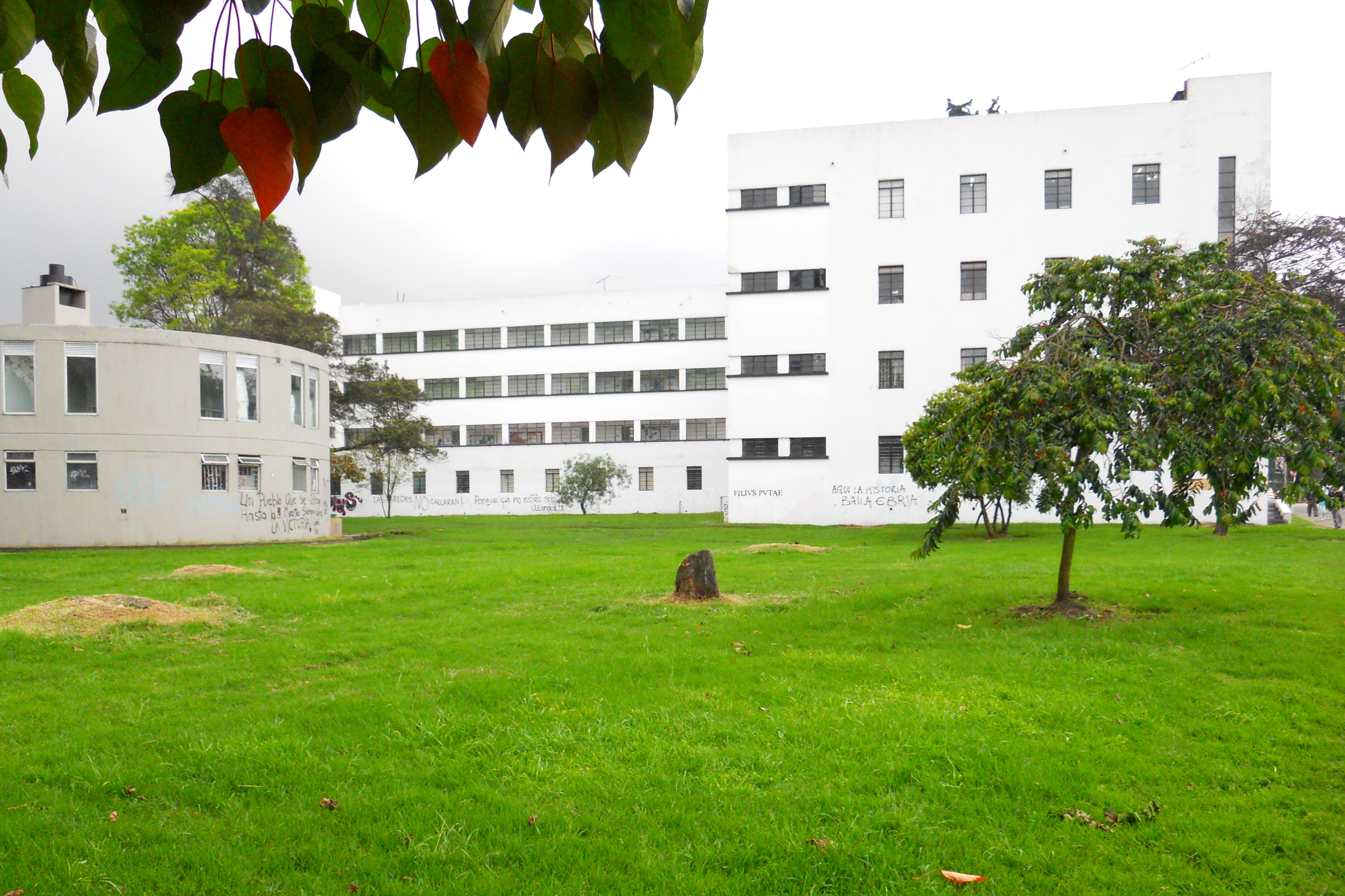 Costado occidental del edificio Antonio Nariño de la Universidad Nacional de Colombia, Bogotá.